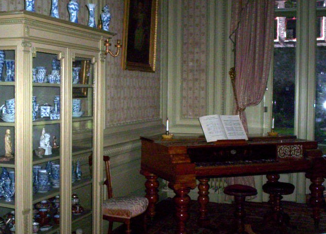 Quatre Mains piano Simon van Gijnhuis